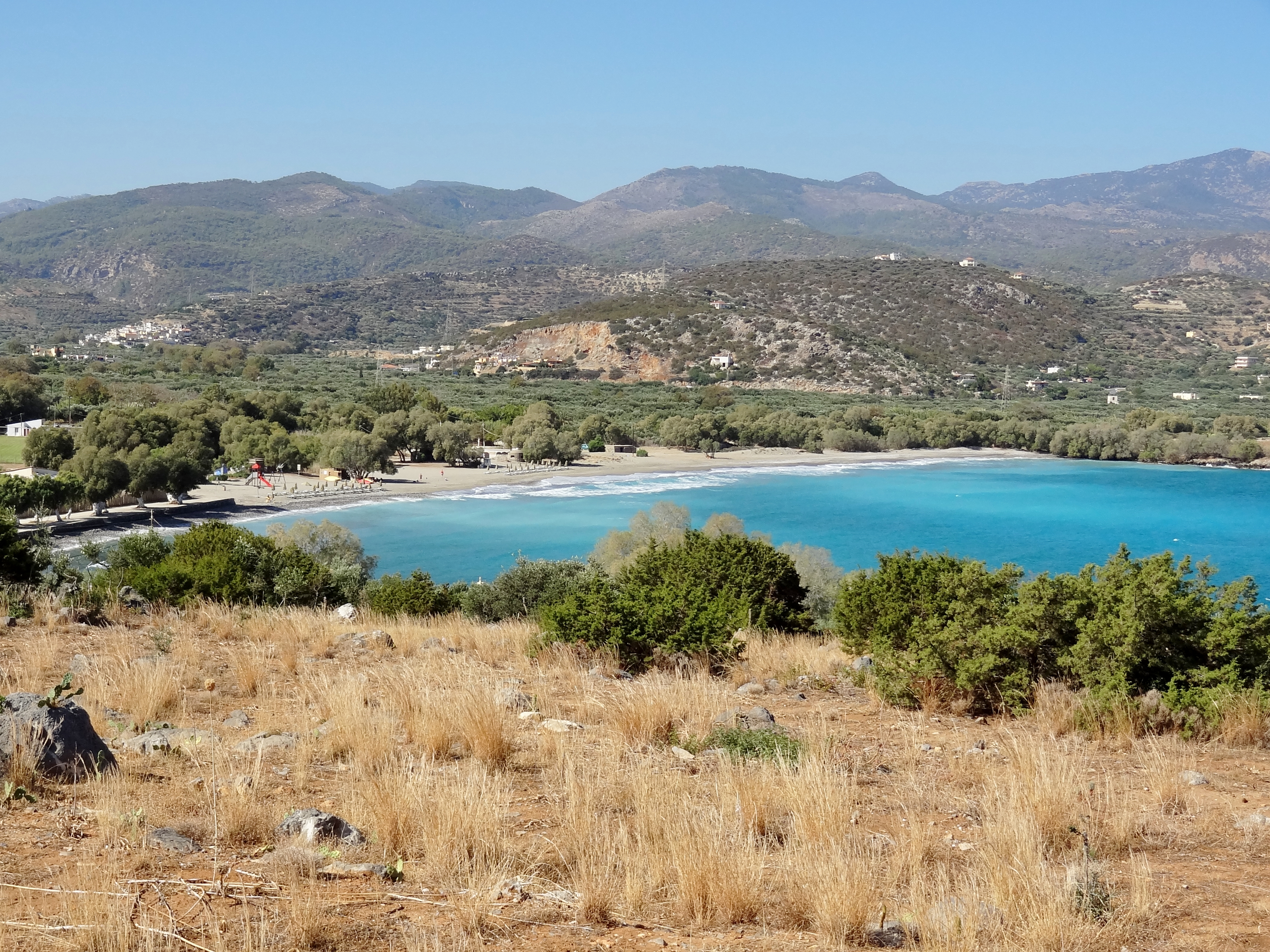 Strand von Agios Pandeleimon (Παραλία Άγιος Παντελεήμων) an der Nordküste Kretas bei Istro (Ίστρο), Ortsgemeinschaft Kalo Chorio (Καλό Χωριό), Gemeinde Agios Nikolaos, Kreta, Griechenland